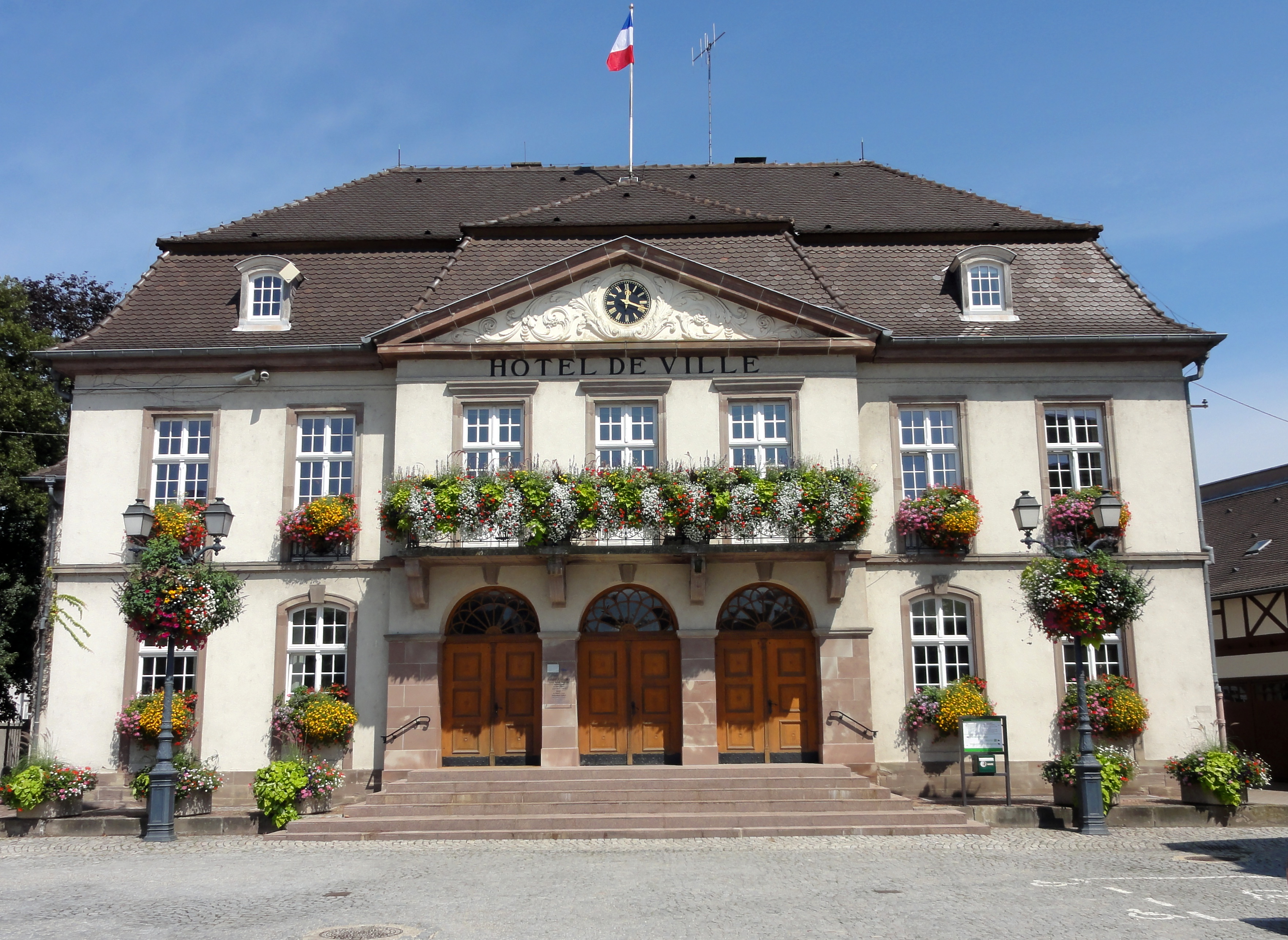 Alsace, Bas-Rhin, Erstein, Hôtel de Ville (1844)